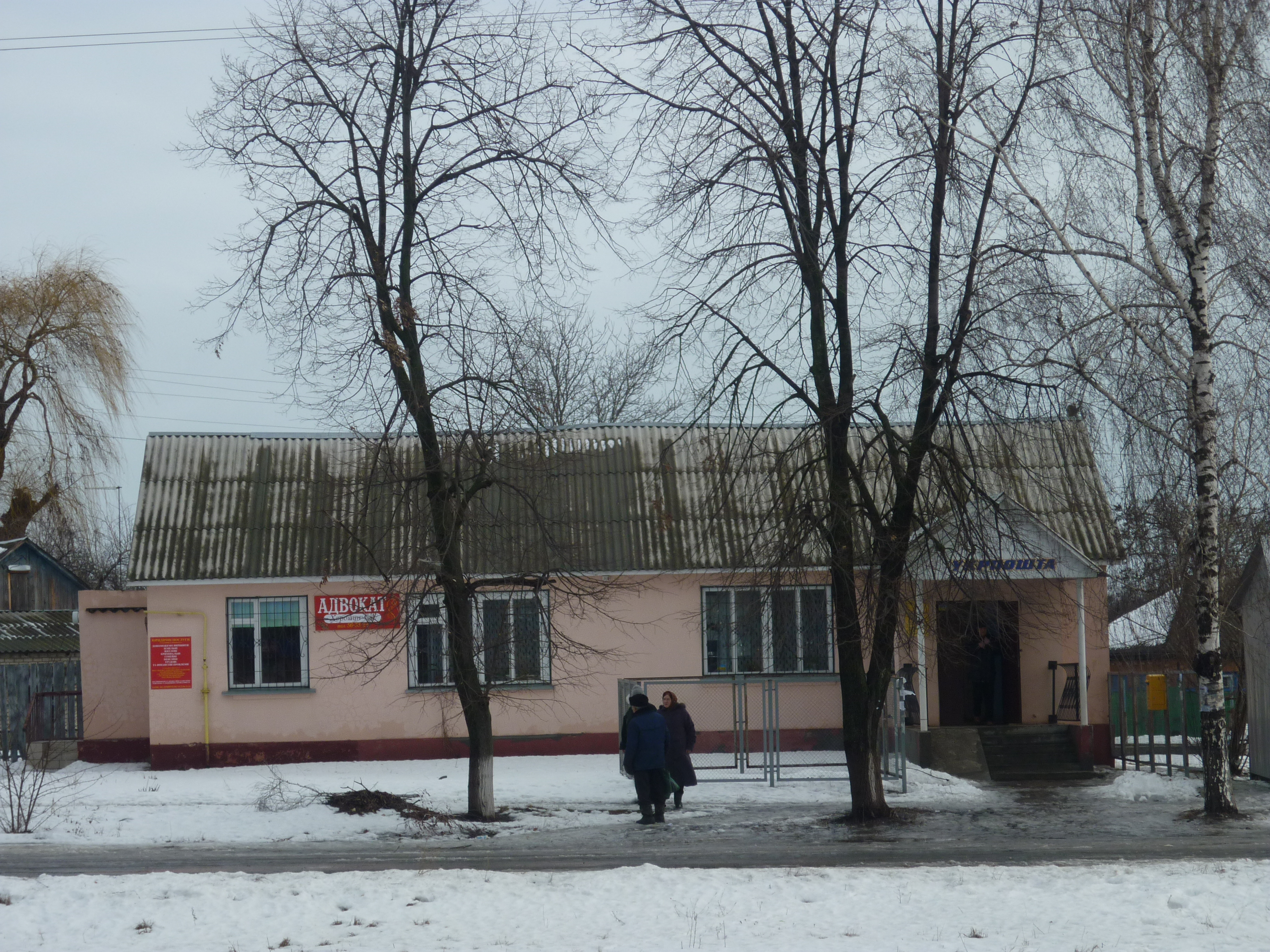 Відділок пошти в селі Червона Слобода Черкаського району